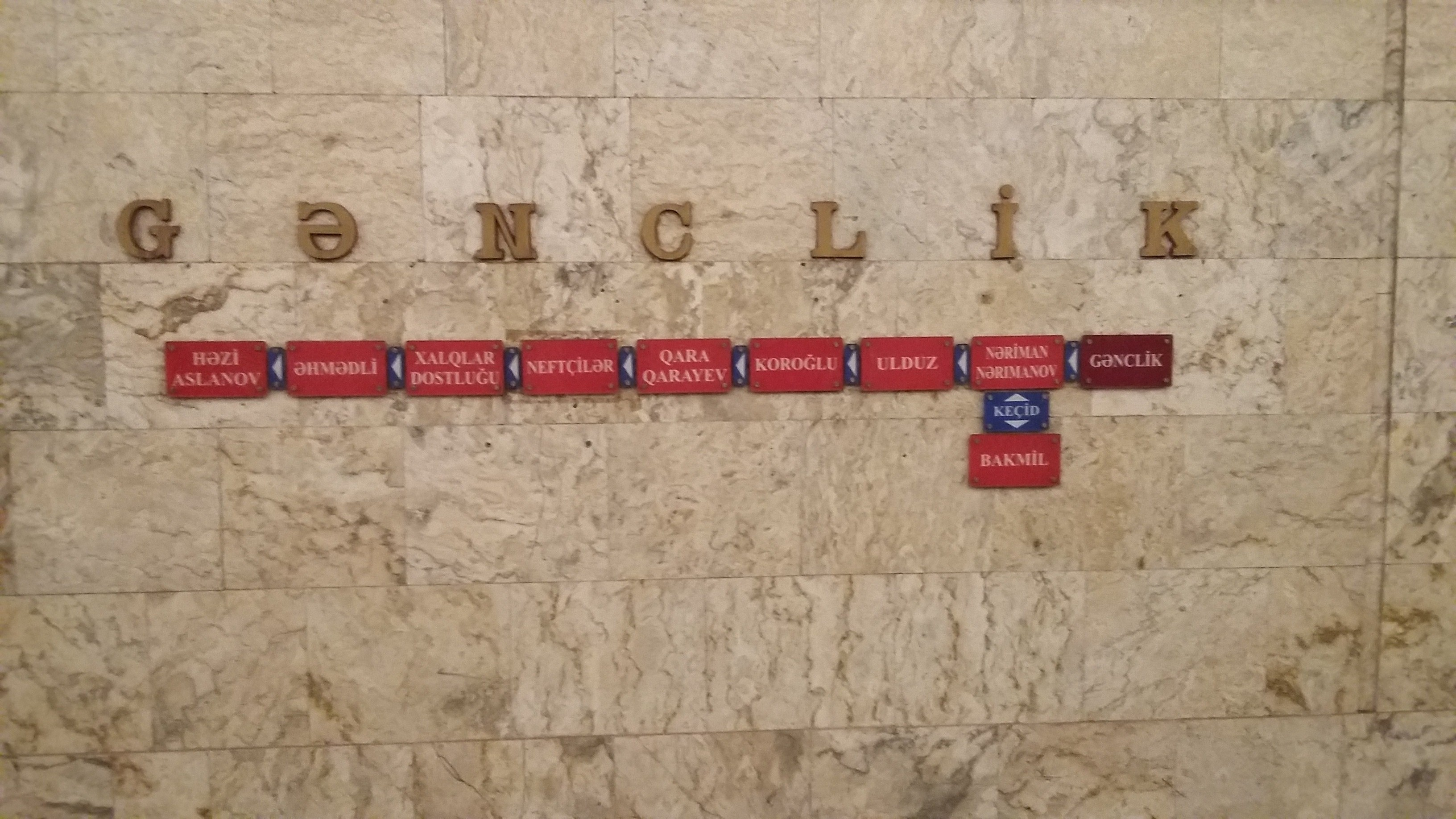 Gənclik metrostansiyası